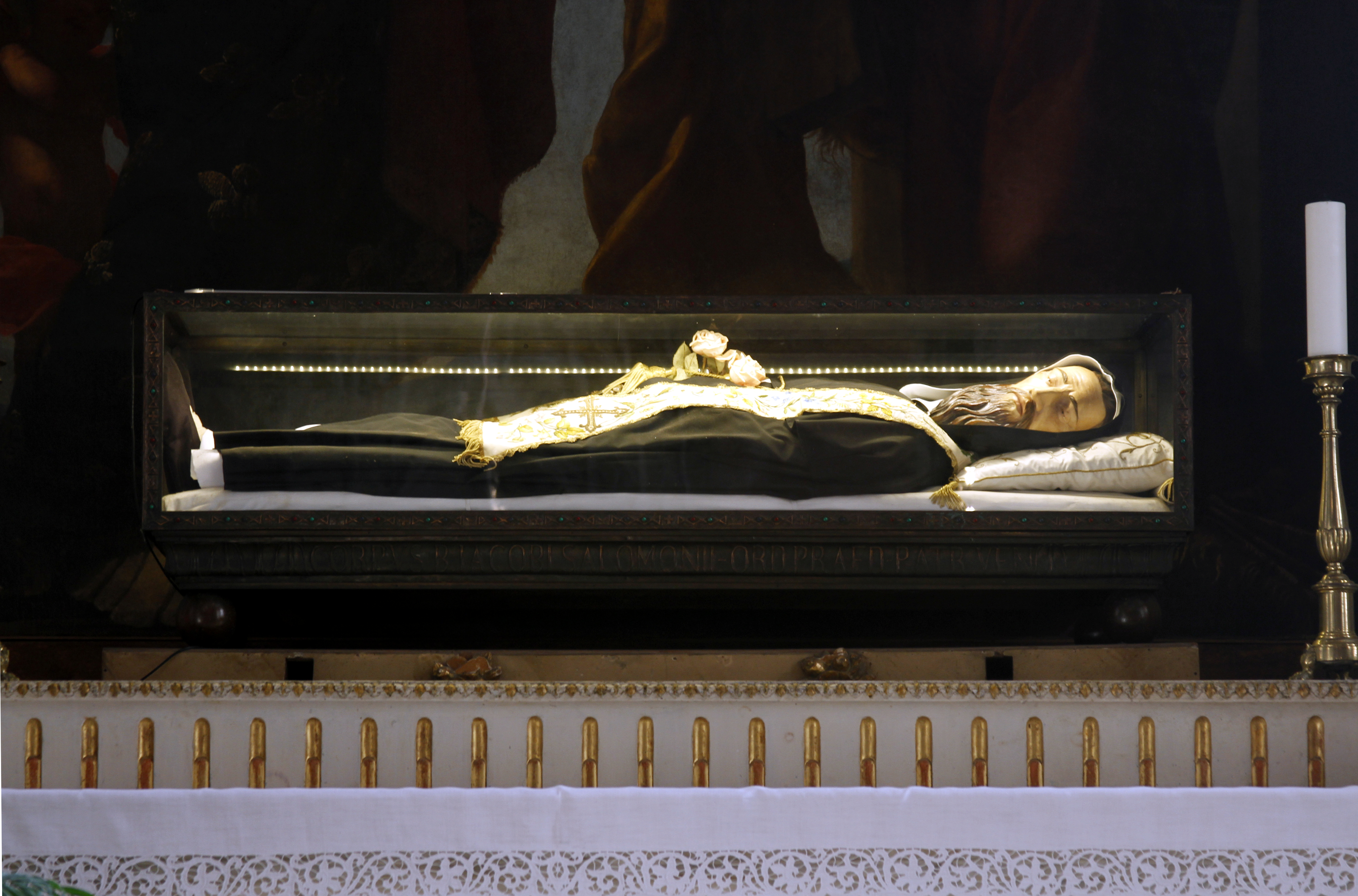 Blessed Giacomo Salomoni